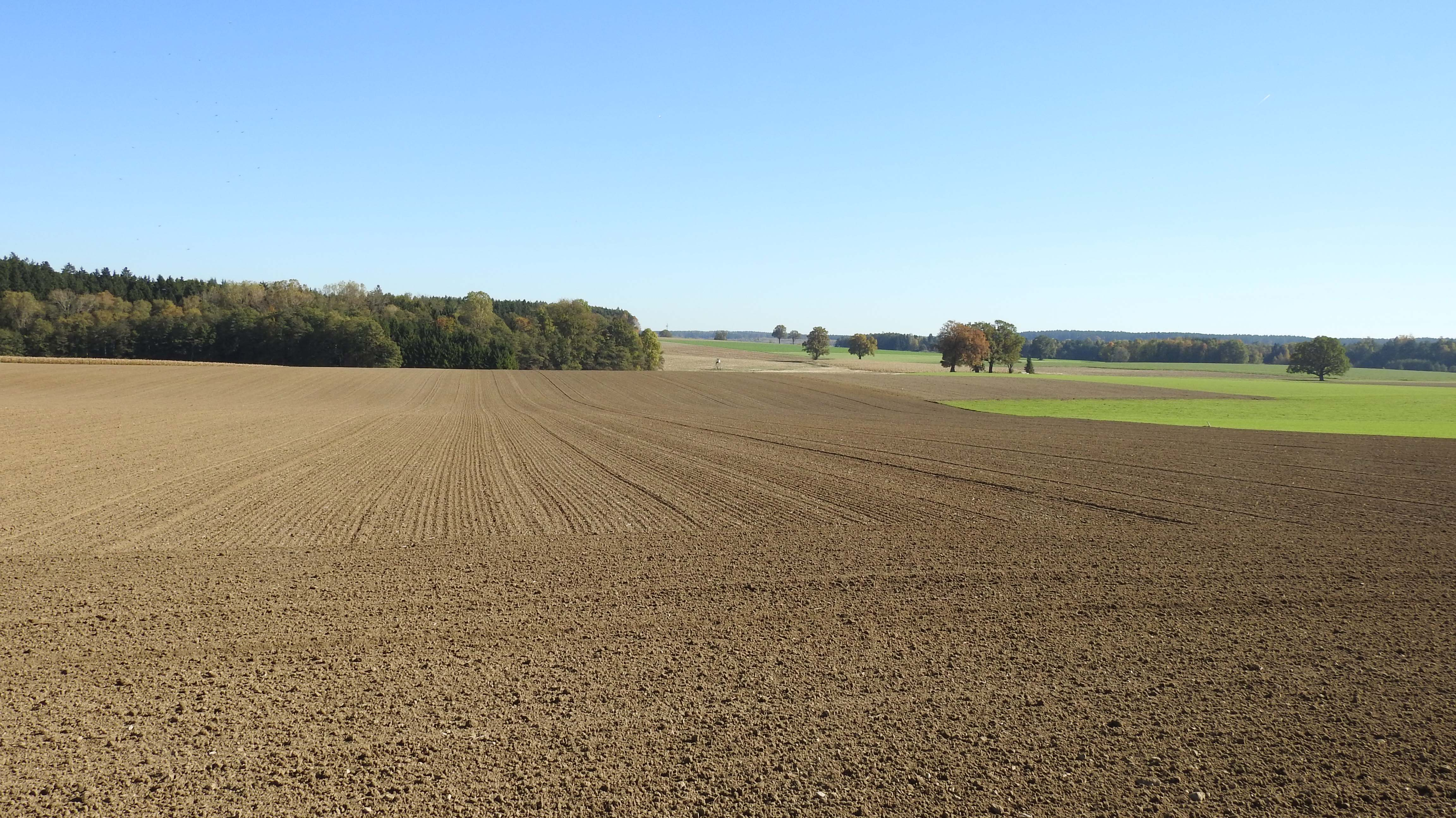 Sanftwelliges Ackerland bei Römertshofen, Moorenweis